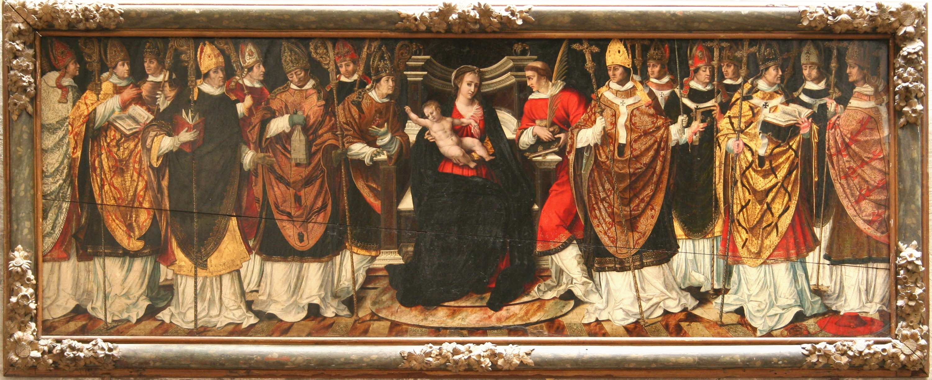 Arles (Bouches-du-Rhône,France), ex-cathédrale St Trophime